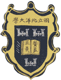 中文（中国大陆）: 国立北洋大学校徽